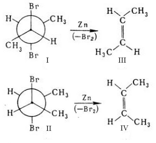 Նկ. 2. 2,3-դիբրոմբուտանի դեբրոմացման ռեակցիայի սխեման